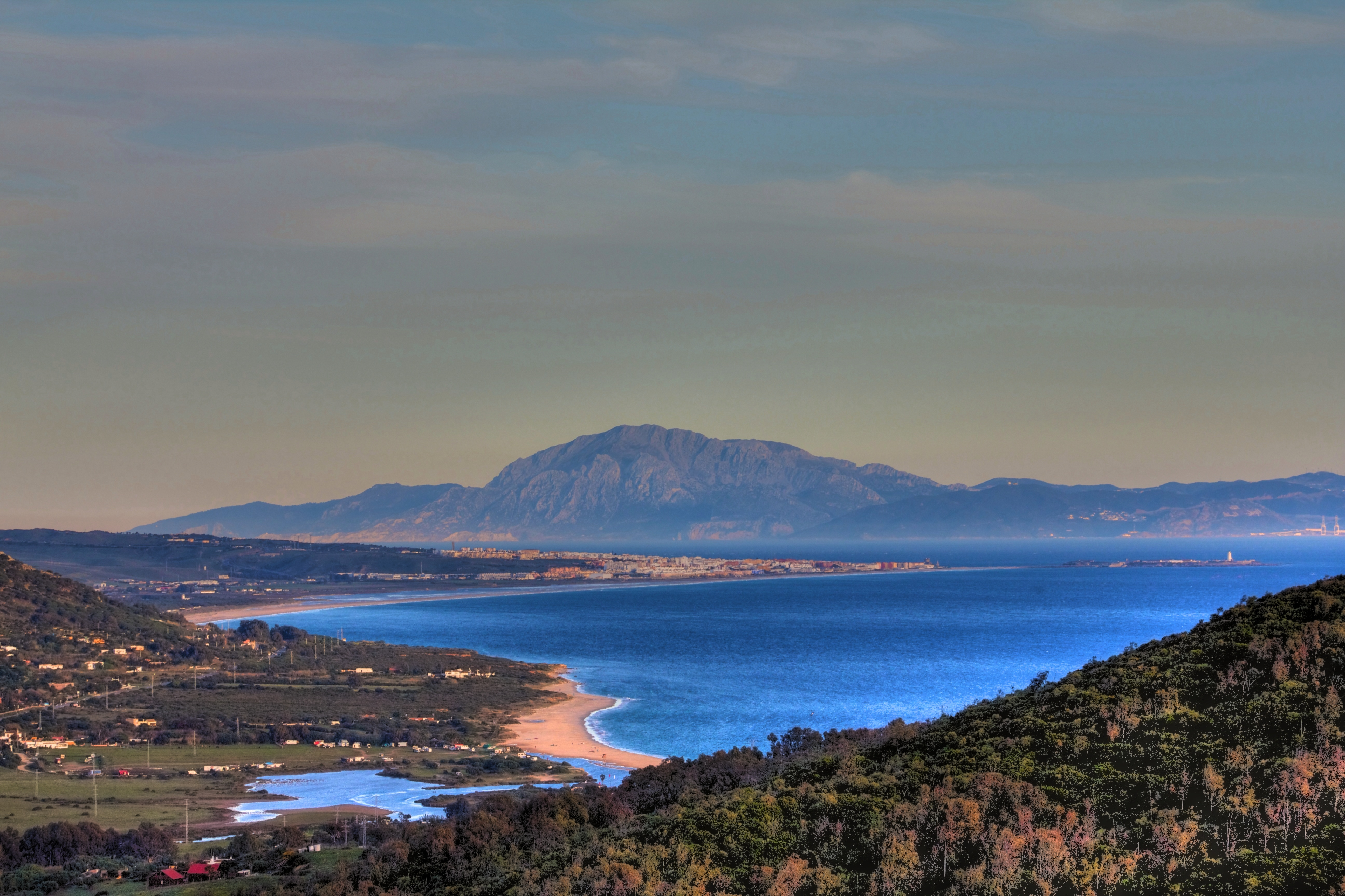 Jebel Musa desde Tarifa